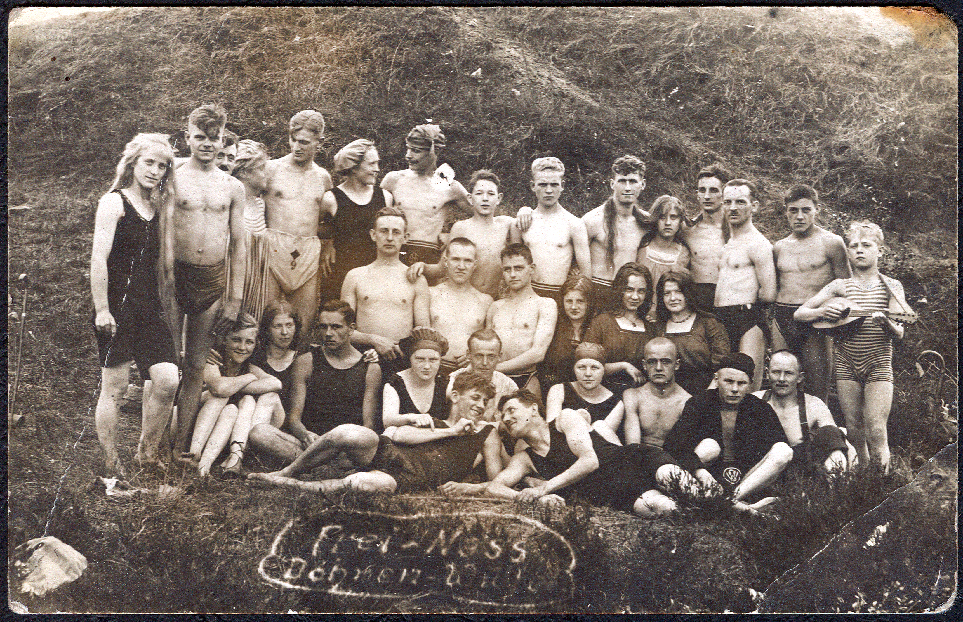 Gruppenbild der Schwimmergruppe Frei-Nass aus Döhren-Wülfel. Die gemischte Gruppe aus jungen Mädchen und Burschen posierte hier um 1920 vor einem nicht identifizierten Fotografen vor einem Erdhügel oder Wall, vermutlich vor einer Badegelegenheit. Neben Badeanzügen wurden auch umfangreiche Badehosen mit unterschiedlichen Aufdrucken getragen ...